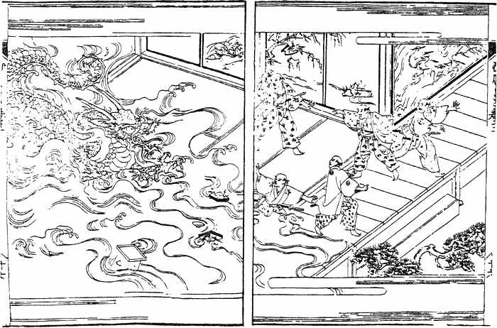 "Kashinkyoshi's magic" from the Tamahahaki (『玉箒木』より「果心居士幻術の事」).